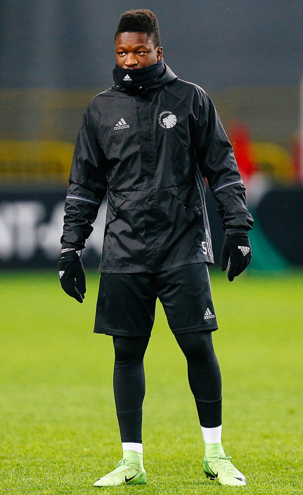 «Копенгаген» опробовал поле «РЖД Арены»